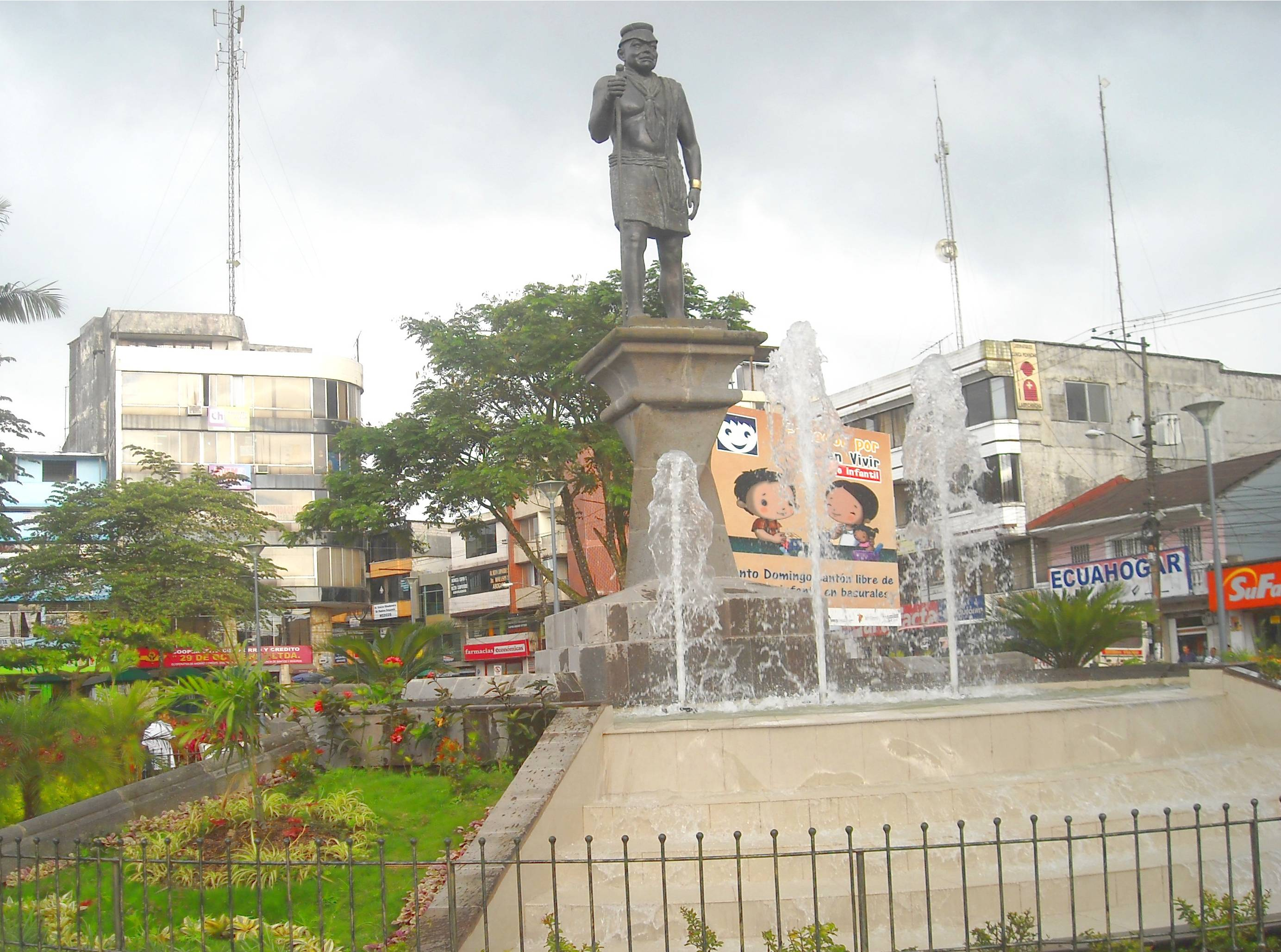 Monumento di Joaquin Zaracay, primo governatore Colorado di Santo Domingo